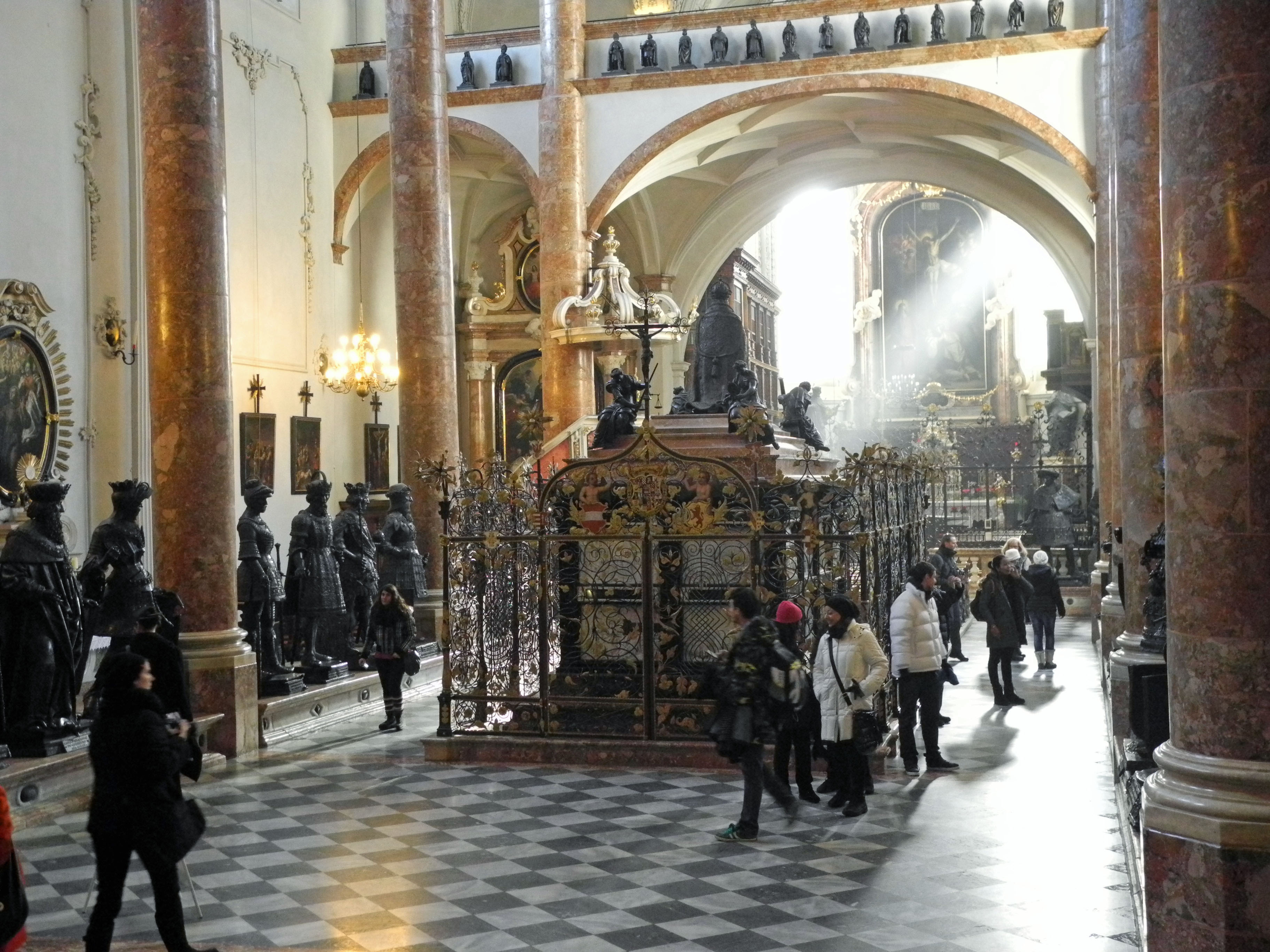 Hofkirche zum hl. Kreuz mit Grabmal Maximilians I. und Silberner Kapelle